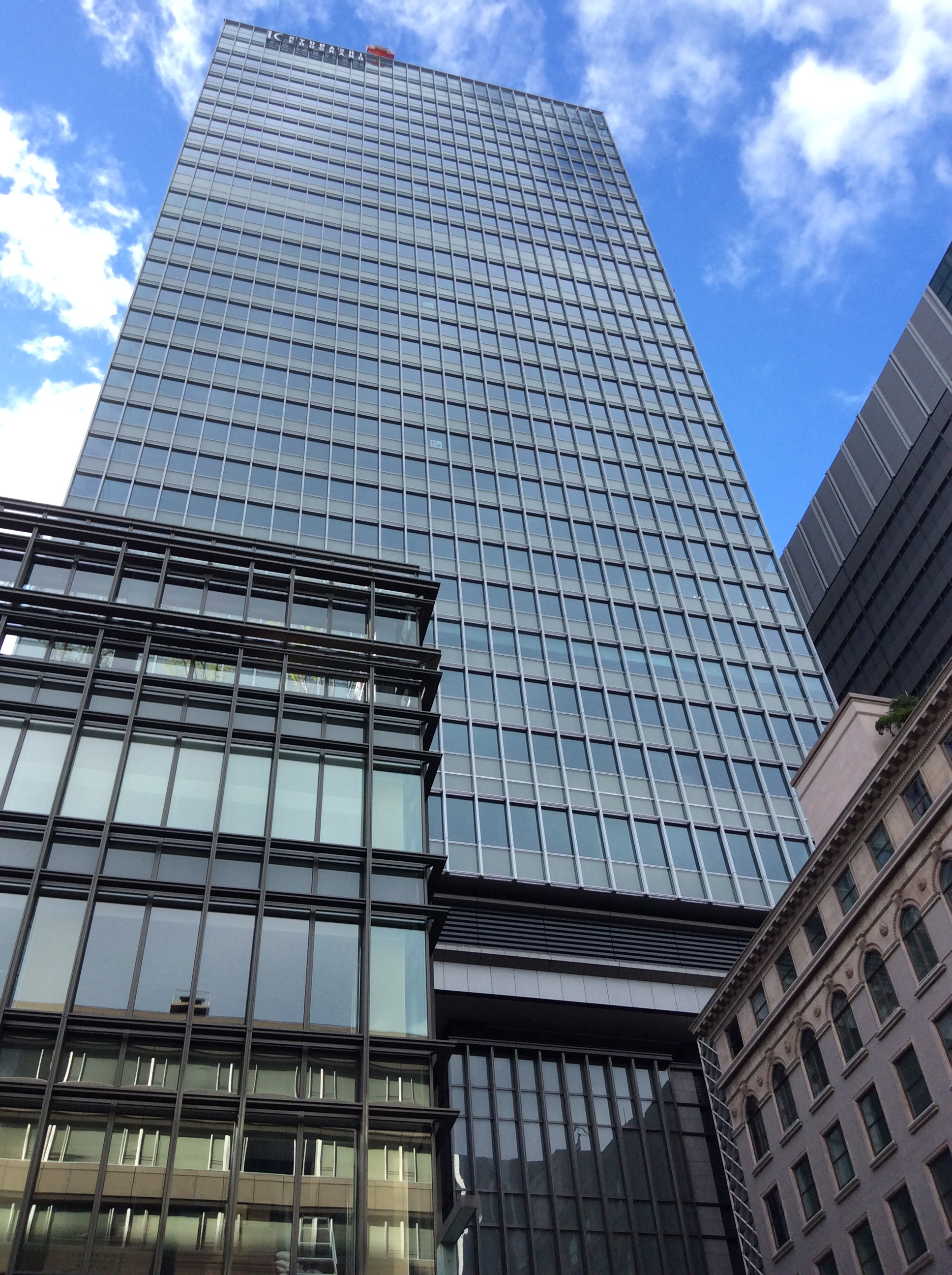 京橋エドグラン